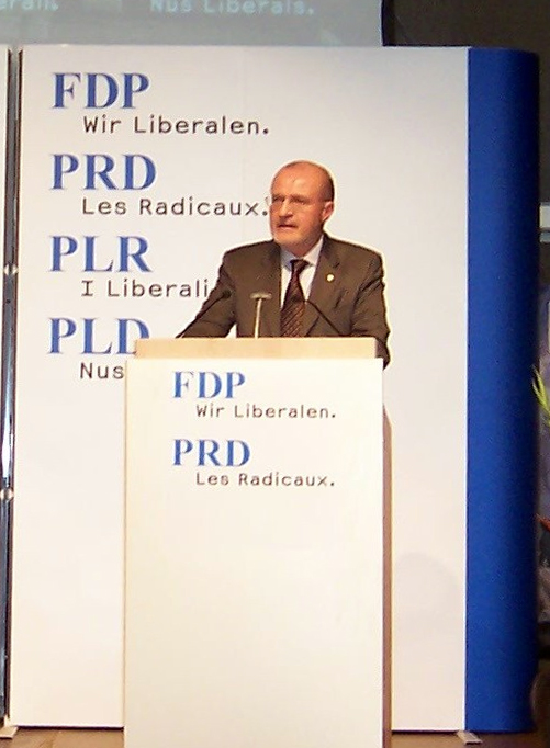 Fulvio Pelli am FDP-Parteitag in Zürich